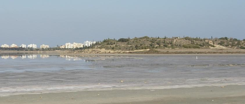 Photo taken Jan 2007